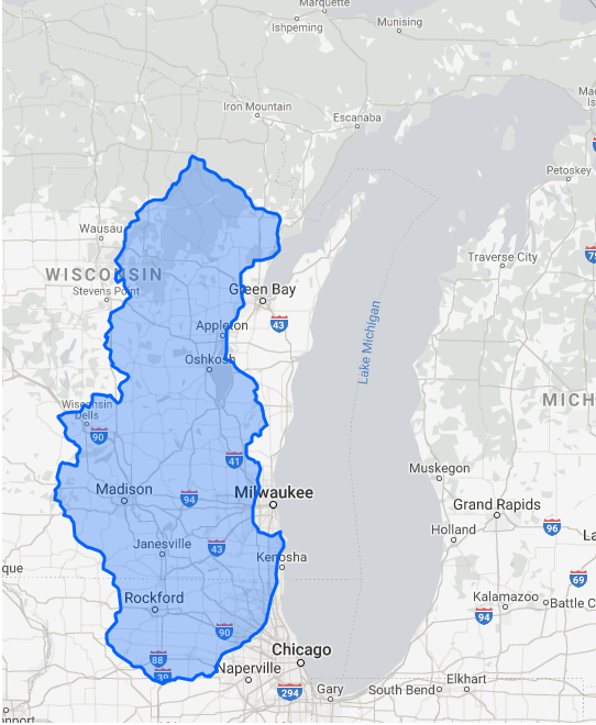 Porovnannie veľkosti Michiganského jazera oproti rozlohe Slovenskej republiky.